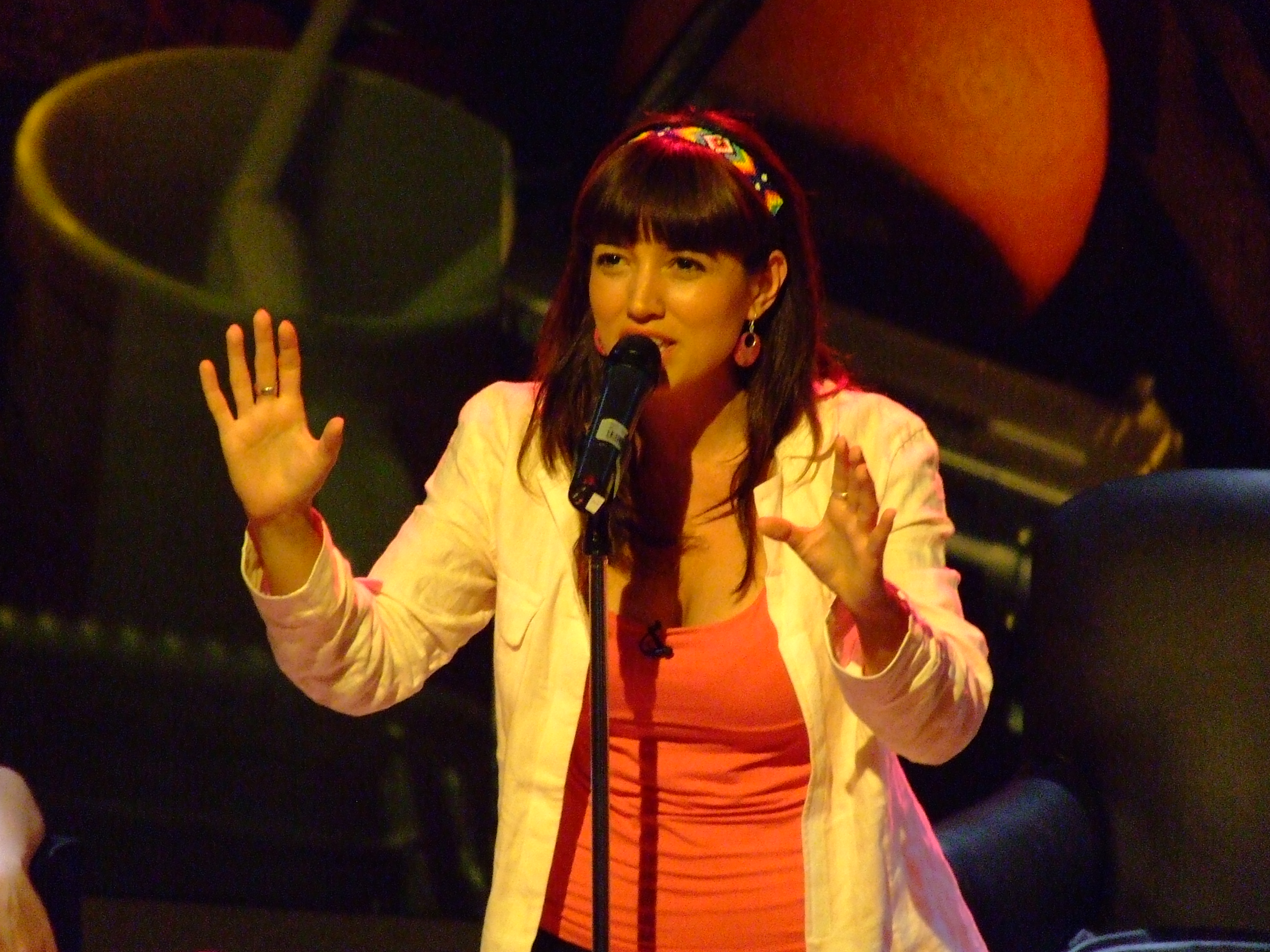 Yamila Reyna, atriz argentina.